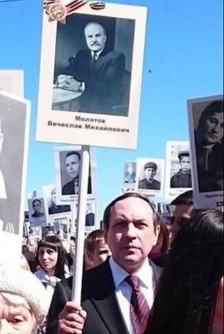 Vjatšeslav Nikonov oma vanaisa Molotovi portreega Surematu polgu rongkäigus